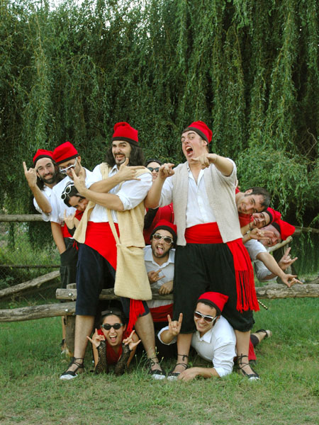 Formació inicial dels Pastorets Rock